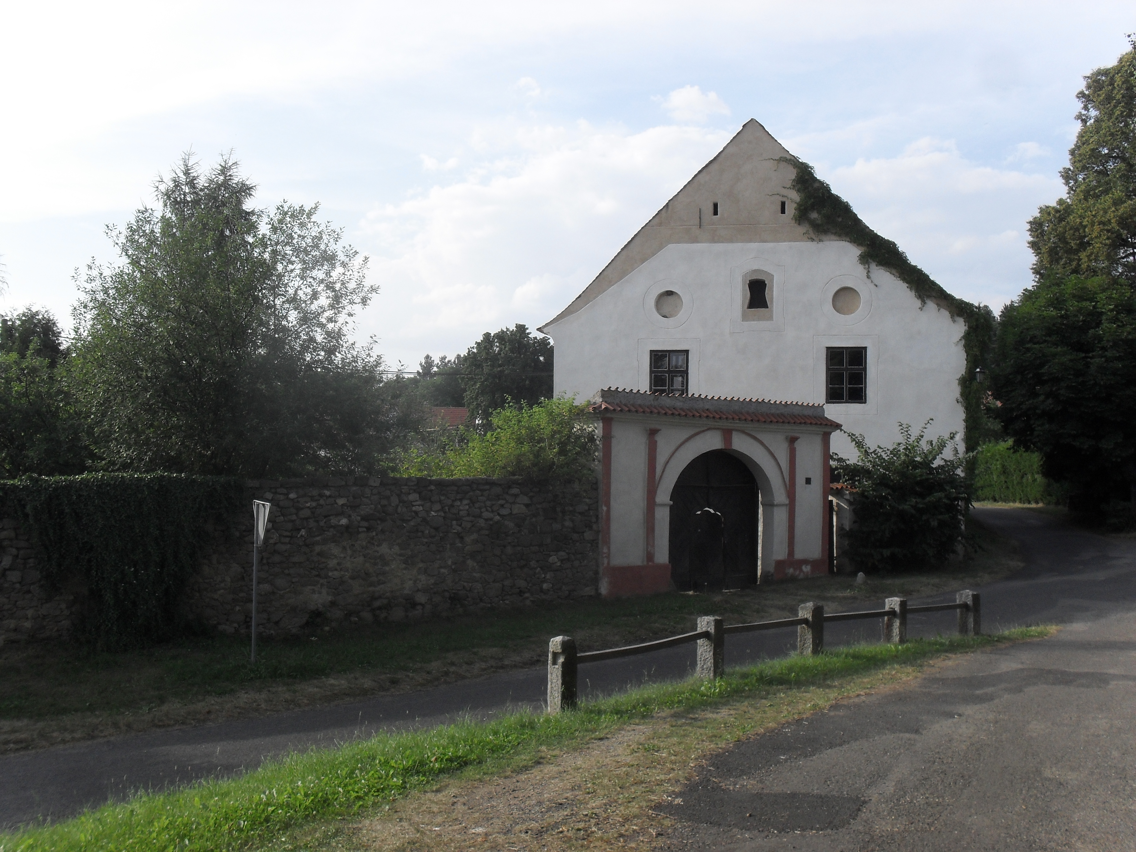 Fotografie pořízena v obci Kvášňovice.